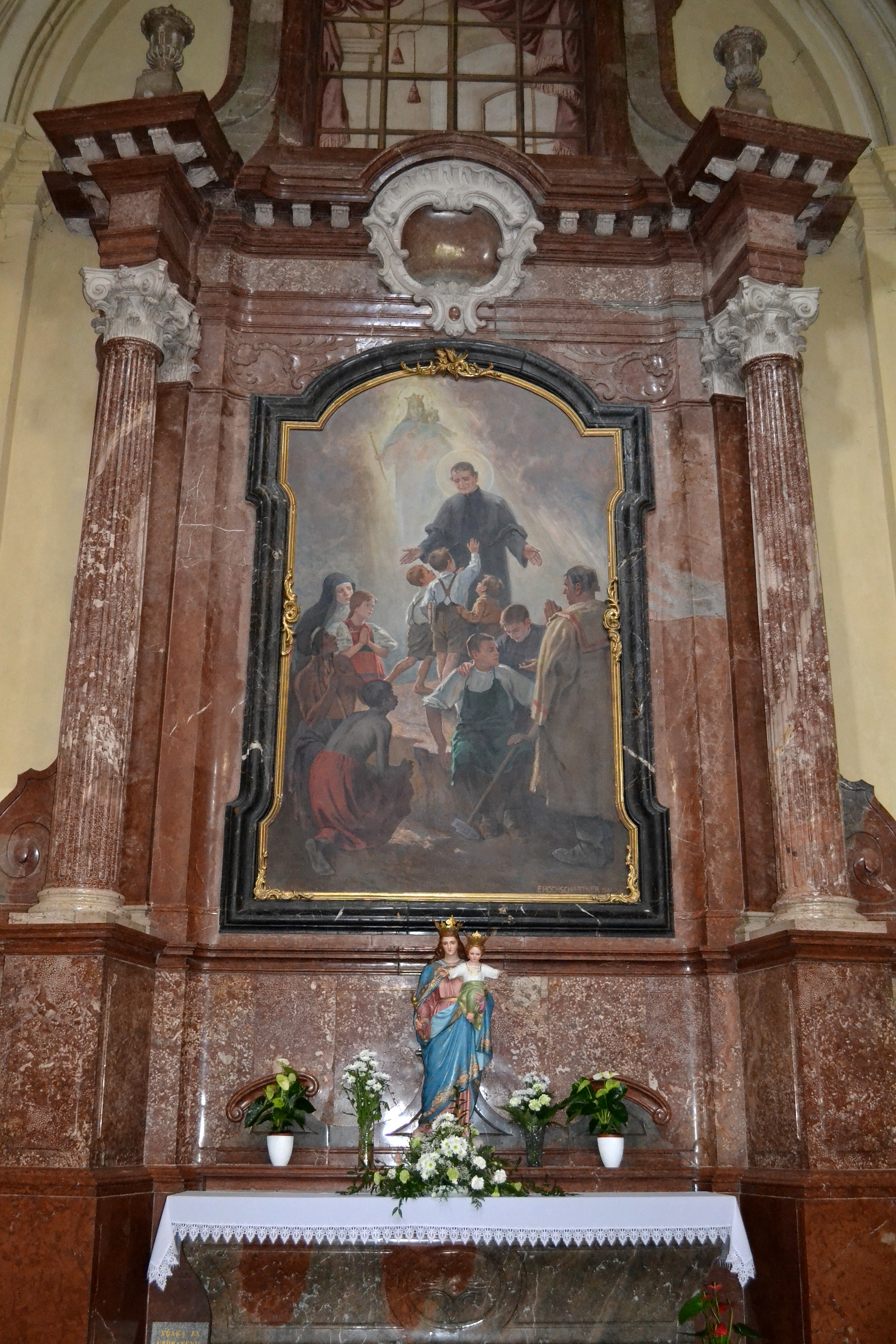 Šaštín-Stráže (okr. Senica), Bazilika Sedembolestnej Panny Márie; kaplnka svätého Jána Bosca